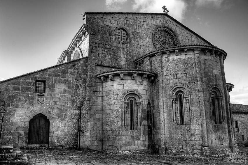 (Concejo de Allariz)